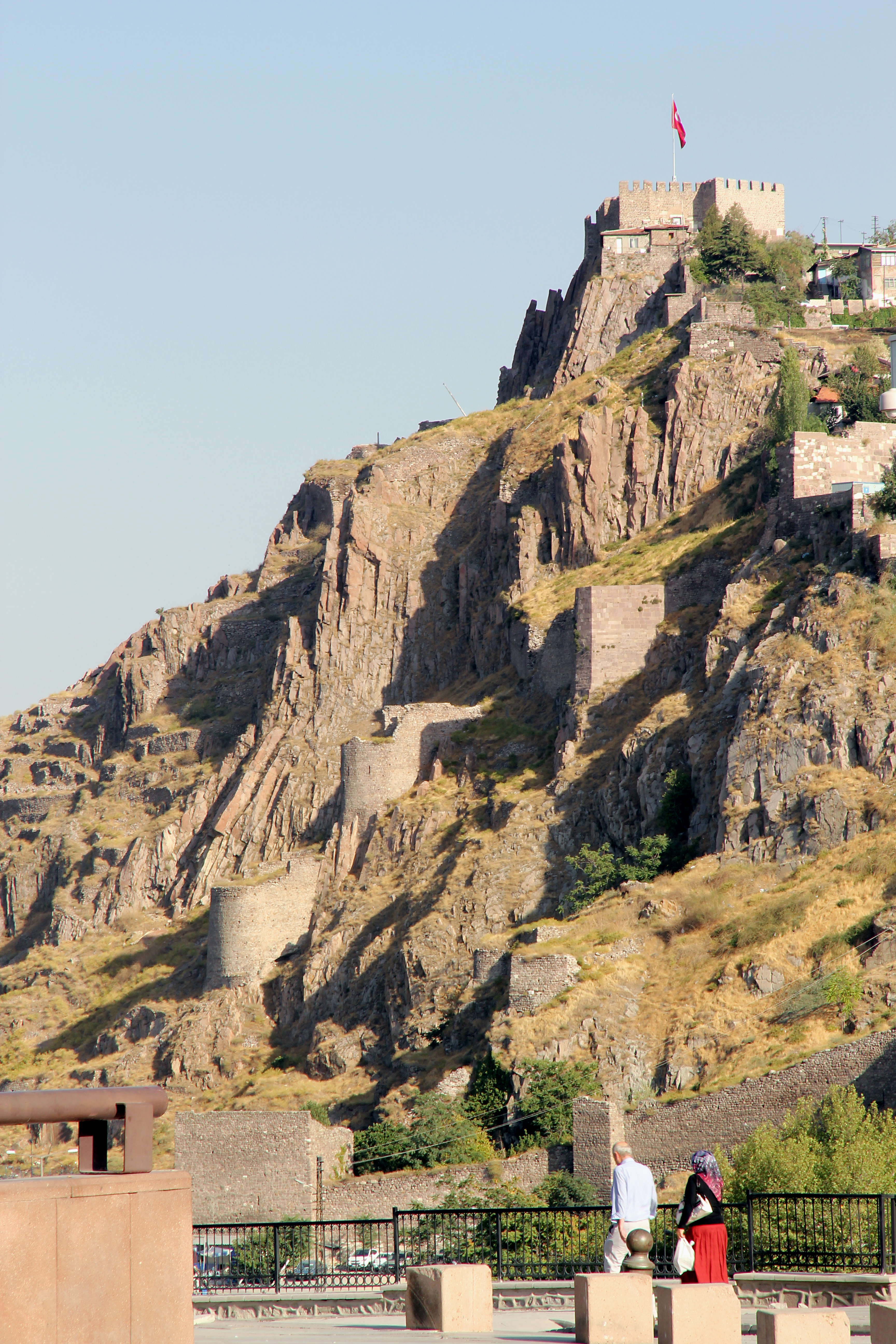 Akkale, Burg von Ankara, Türkei